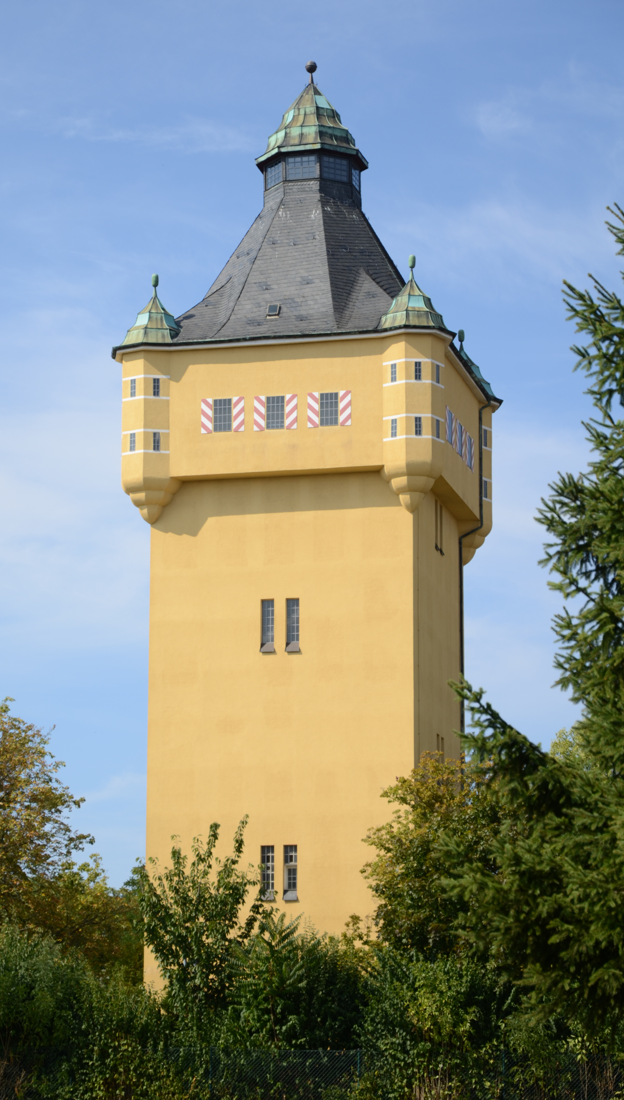 Schweinfurt Berliner Platz 7